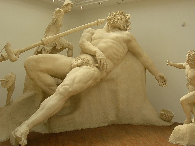 Gruppo di polifemo, sperlonga